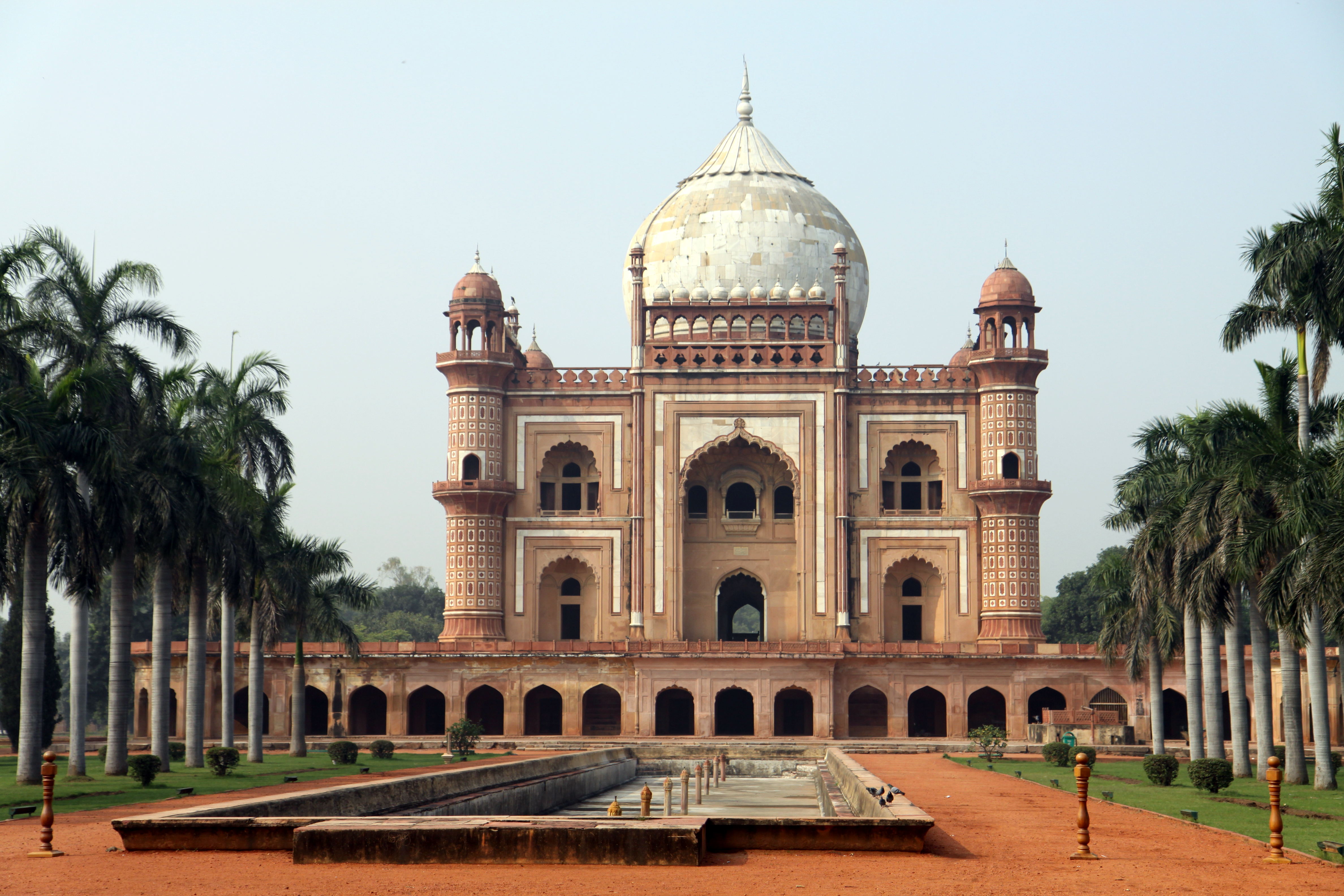 Safdarjang's Tomb